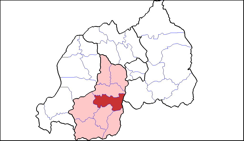 Distretto di Nyanza.